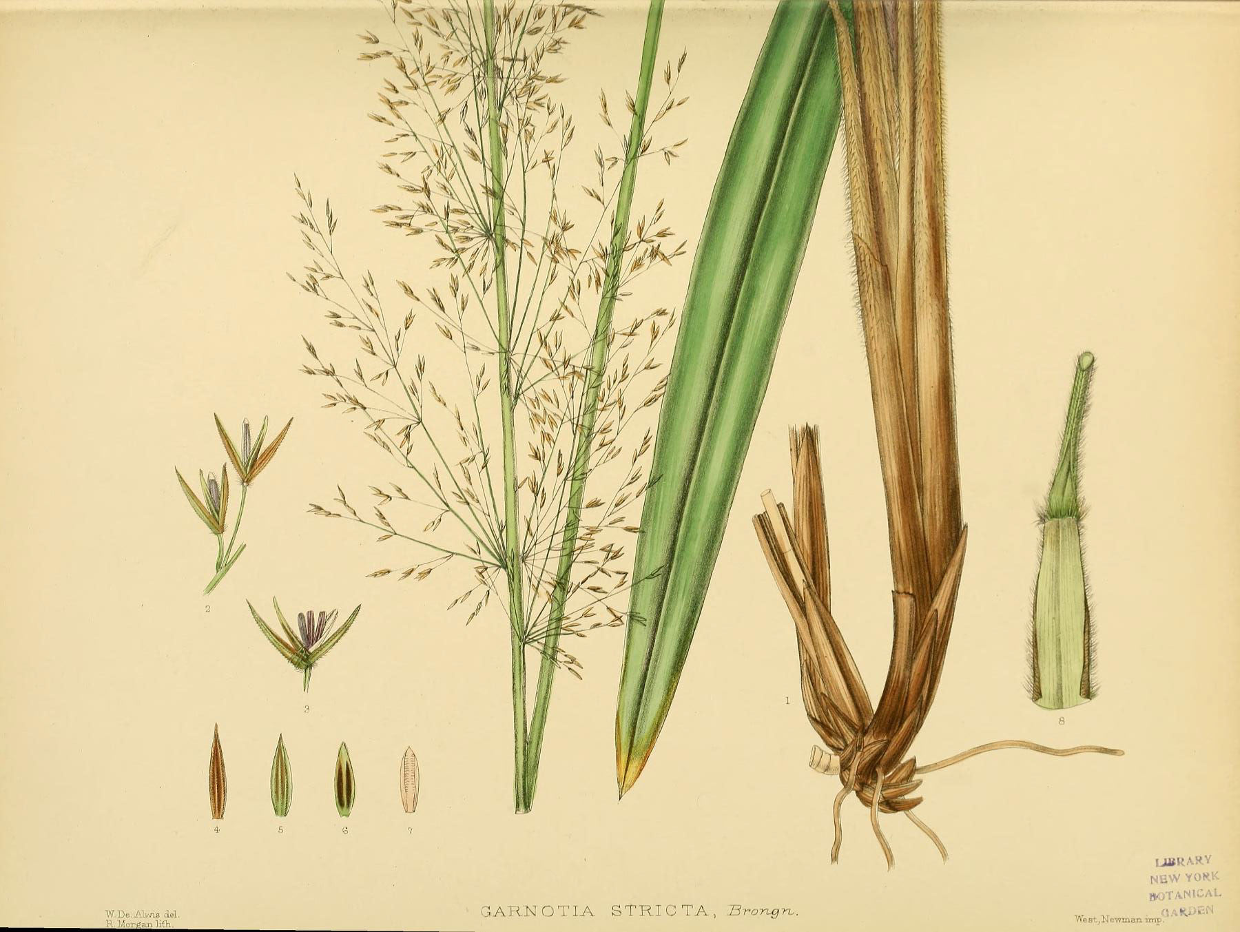 2r I i23 3 . E- O i— i E- . t— t H C .